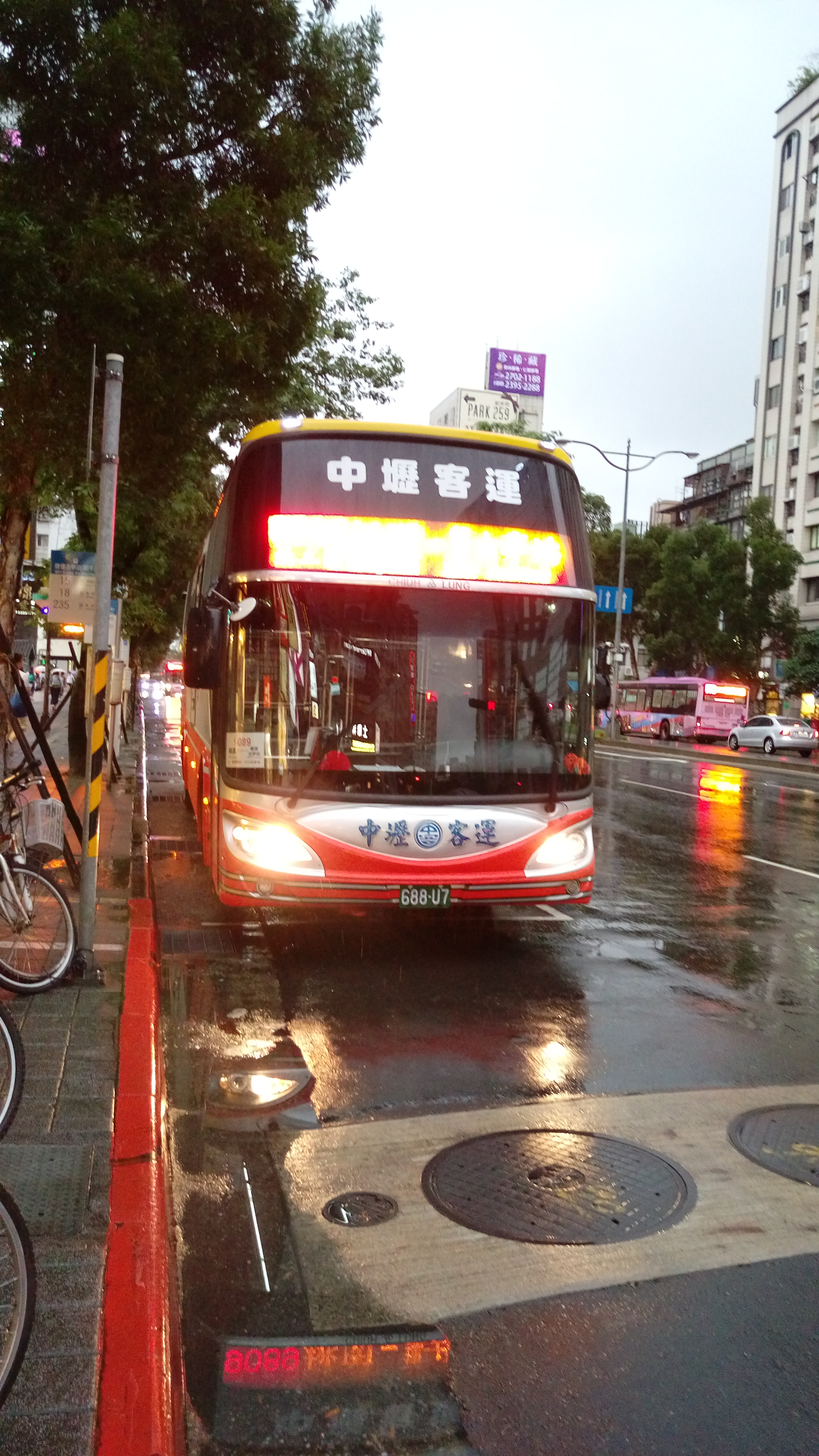 中壢客運2016（2017）HINO RN8JVU